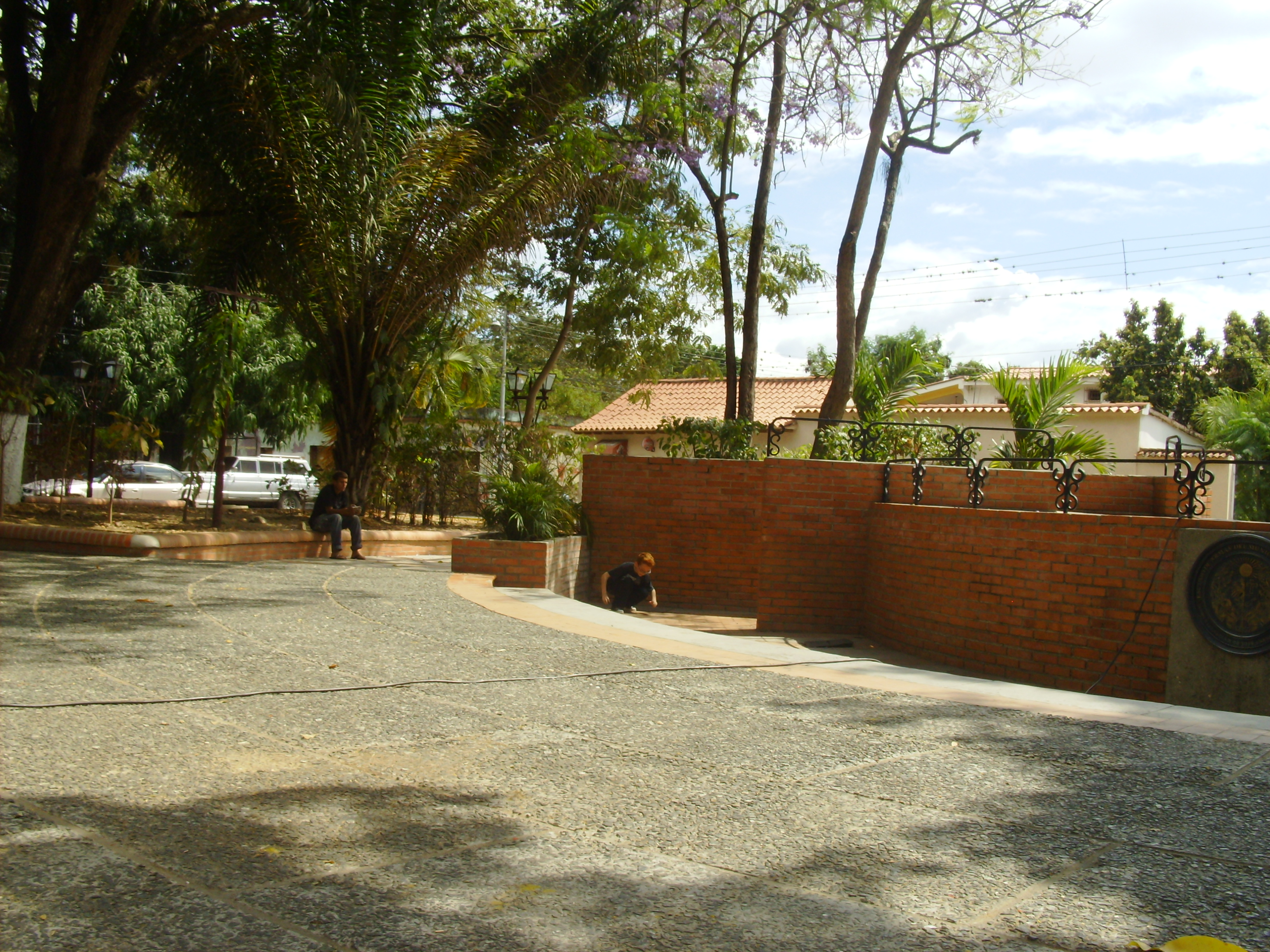 Plaza Bolivar San Diego Edo. Carabobo